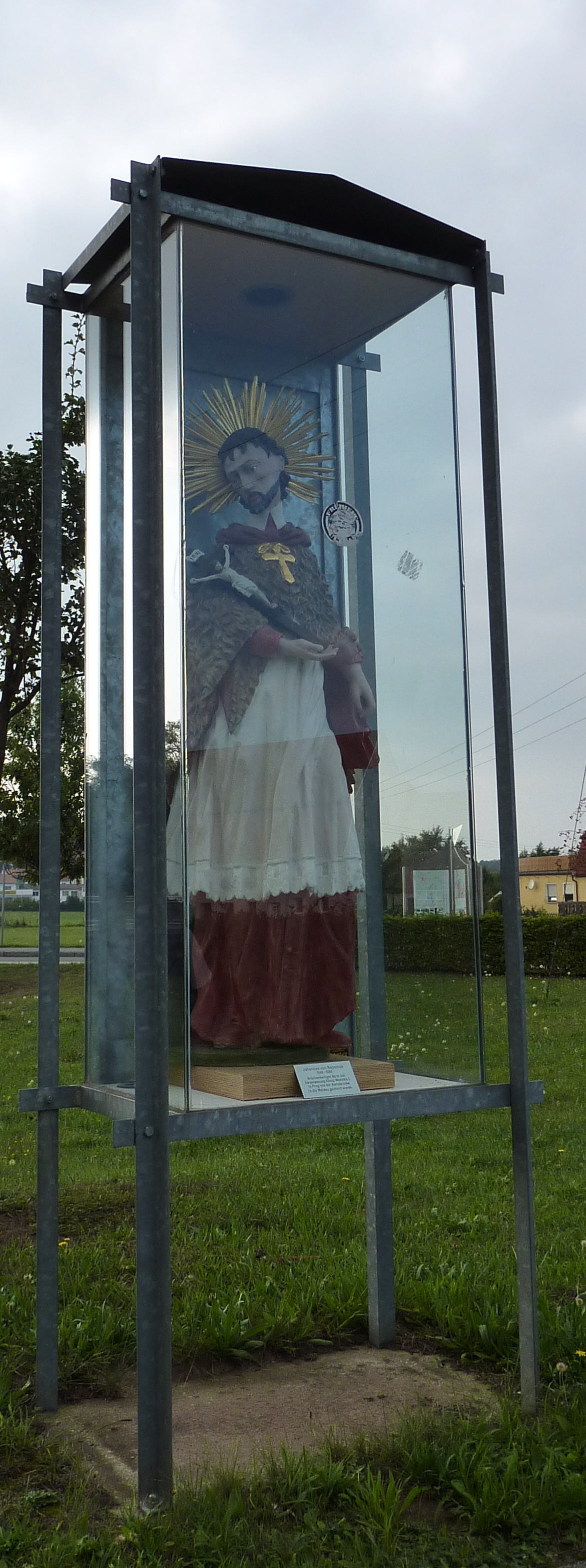 Figur des heiligen Nepomuk in Spalt an der Fußgänger-/Radfahrerbrücke